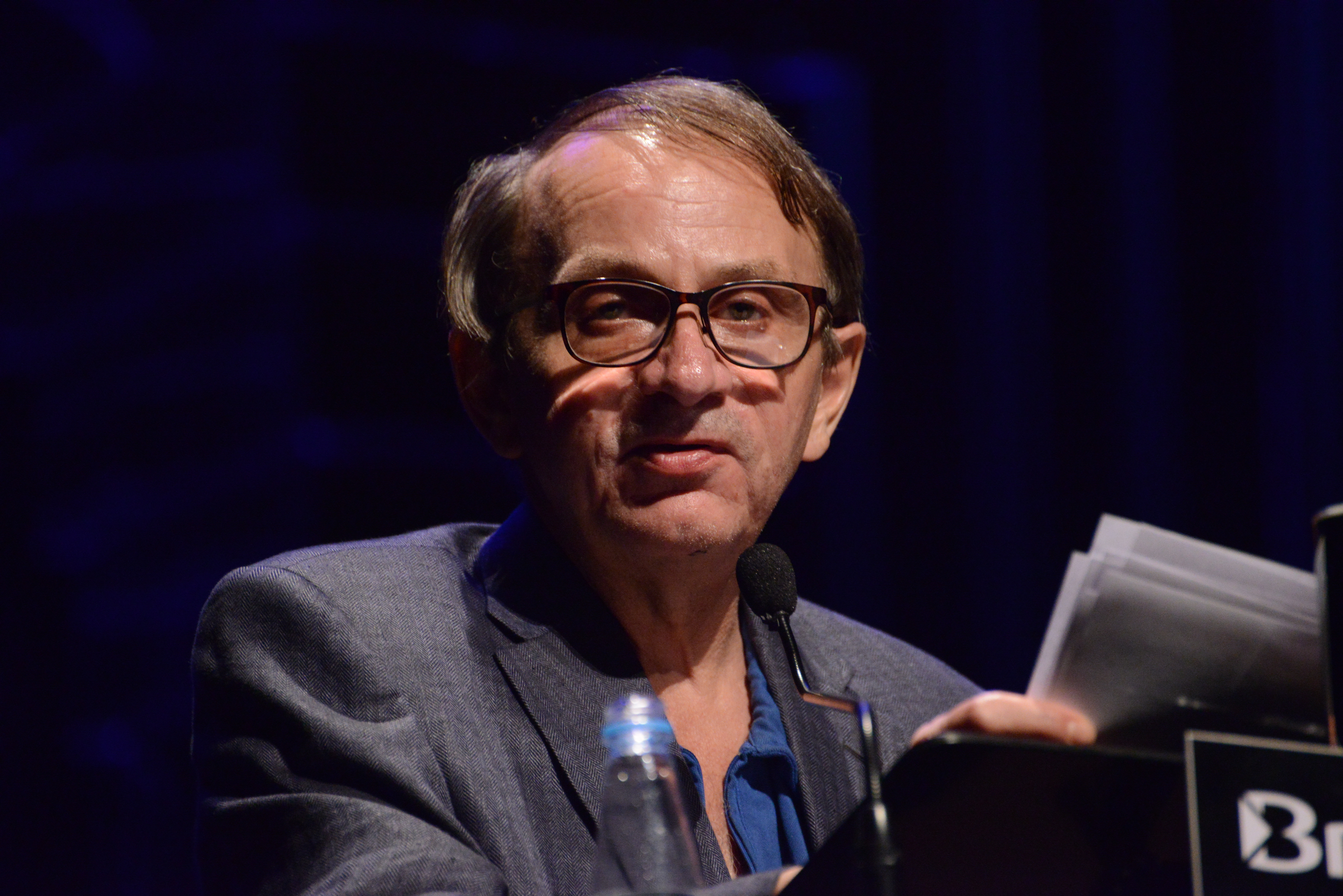 Convidado: Michel Houellebecq, escritor francês Data: 07 de novembro de 2016 Local: Salão de Atos da UFRGS Crédito das imagens: Fronteiras do Pensamento | Luiz Munhoz